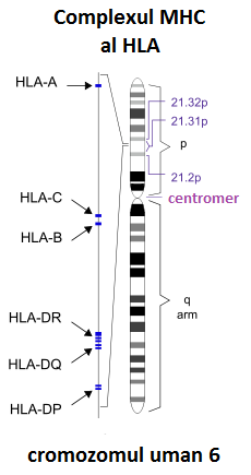 Complexul MHC al HLA